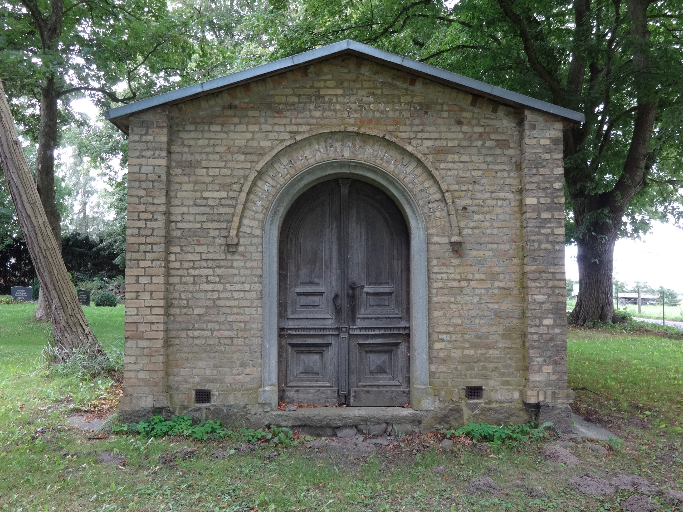 Dorfkirche in Rubkow aus der zweiten Hälfte des 14. Jahrhunderts mit Reliefs der Evangelisten aus dem 17. Jahrhundert und Kabinettscheiben der Familien Below und Quistorp; auf dem Friedhof ein Mausoleum aus dem Jahr 1877 für August von Quistorp und seine Frau Emilie.